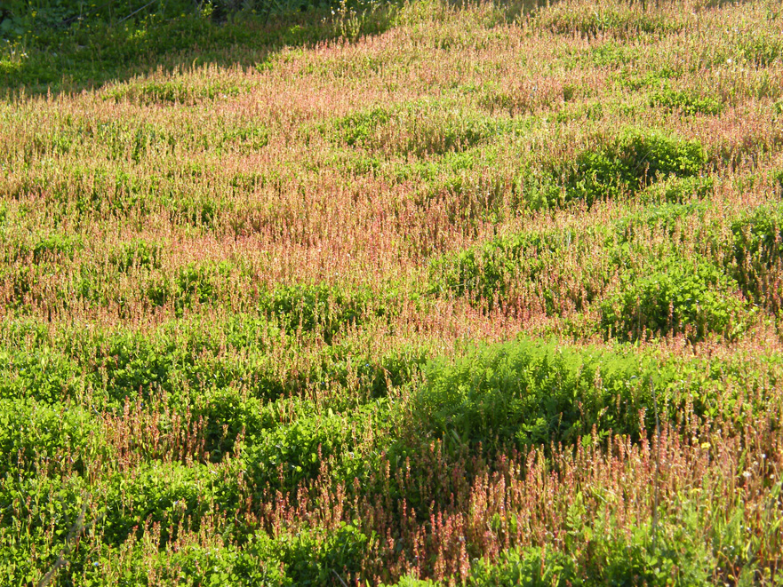 צולם ע"י עדו ארמיאץ בשדות באר יעקב